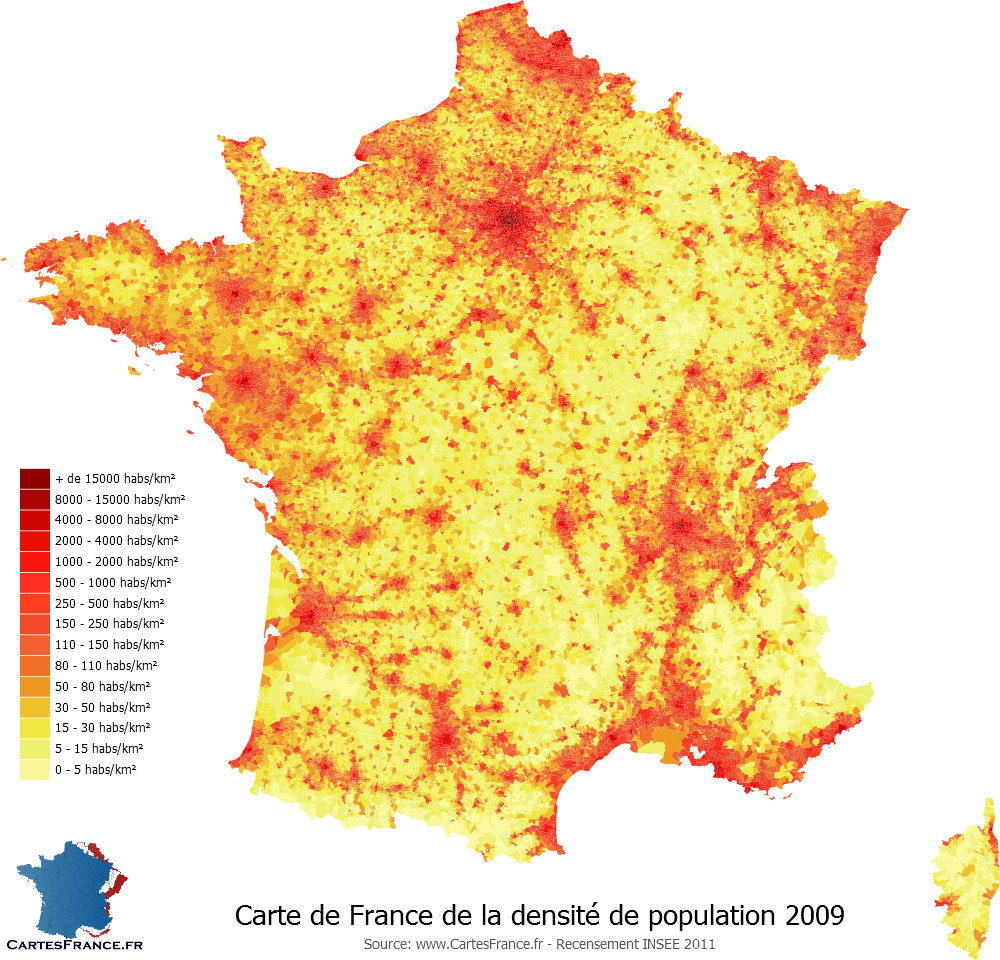 Densité de population par km² dans la partie européenne de la France en 2009.